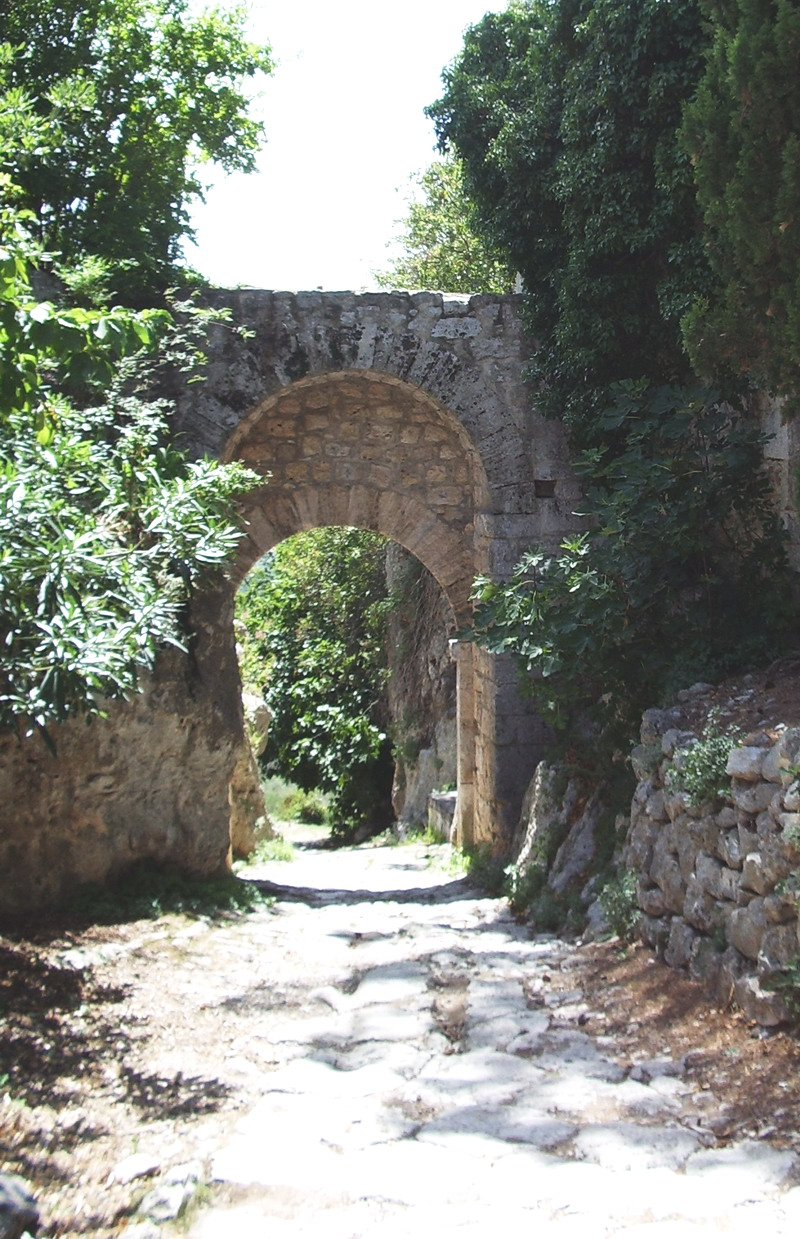 descrizione: La Via Clodia che entra a Saturnia (GR) attraverso Porta Romana lavoro personale di Vinattieri Matteo che lascia in pubblico dominio il 04/02/2007; foto digitale scattata nell'agosto 2006 e rielaborata successivamente